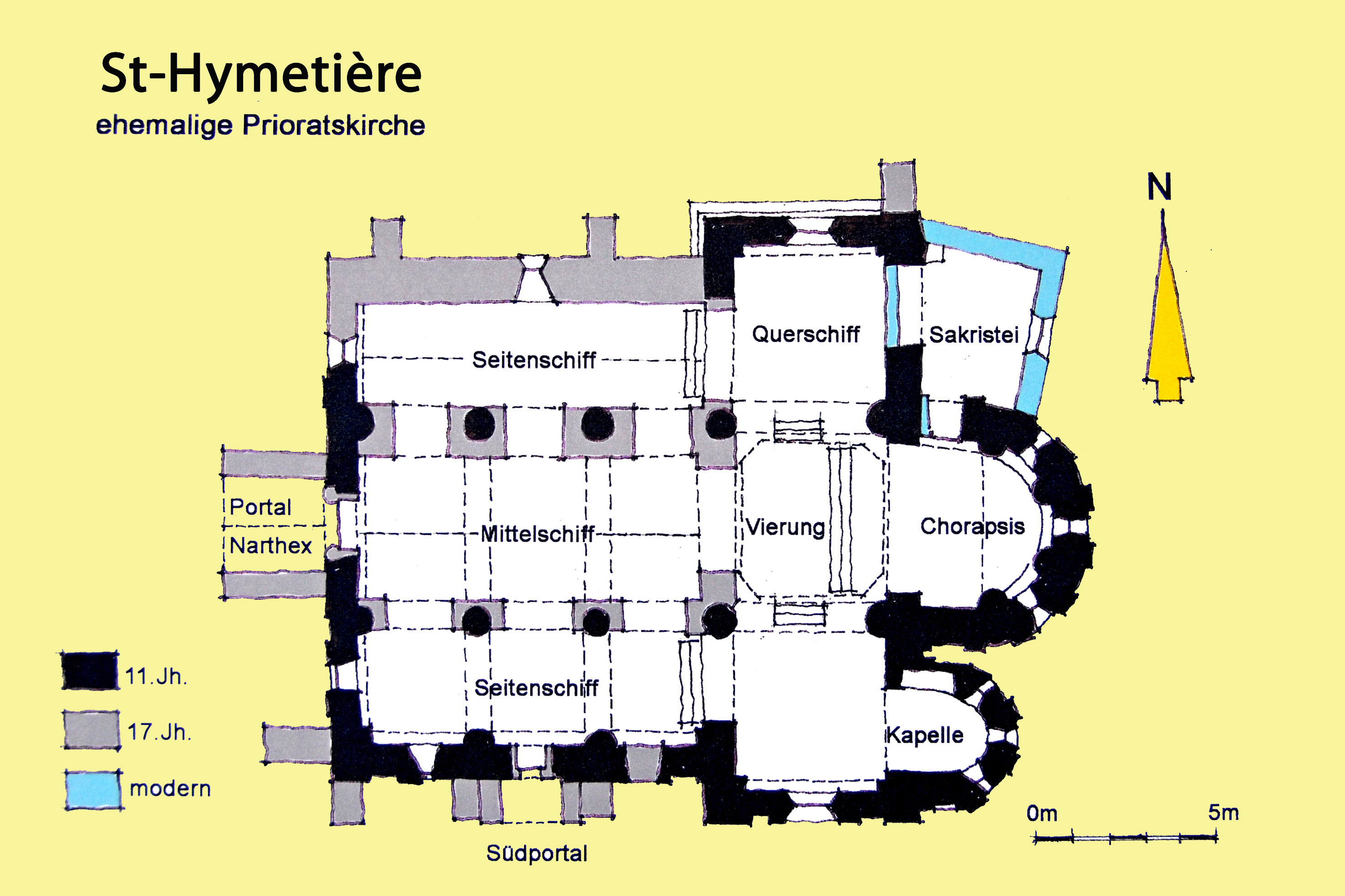 St-Hymetière, Grundriss, Handskizze